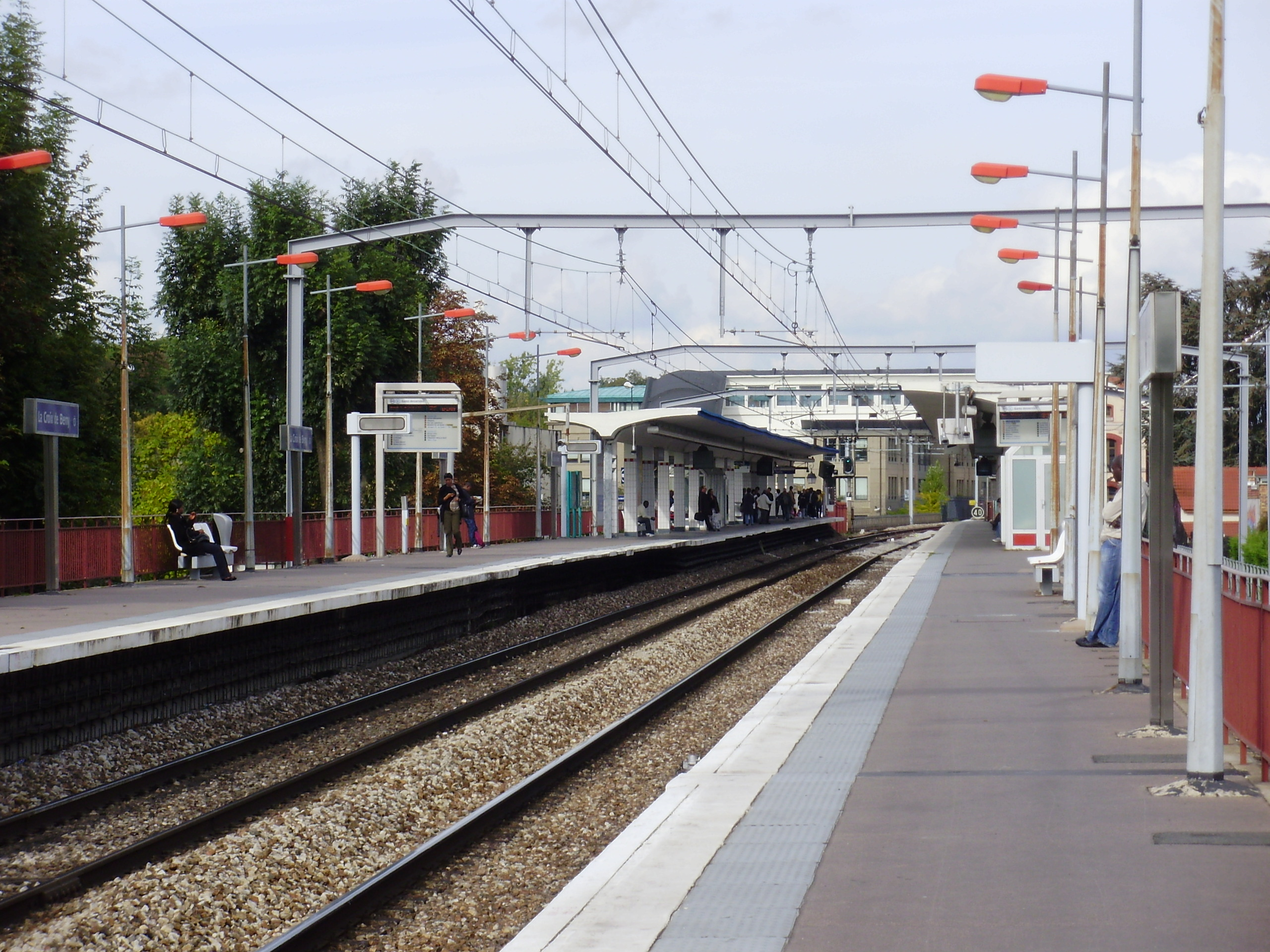 Gare de La Croix de Berny, à Antony, Hauts-de-Seine, France (vue en direction d'Aéroport CDG 2/Mitry - Claye depuis le sud du quai pour Saint-Rémy-lès-Chevreuse)